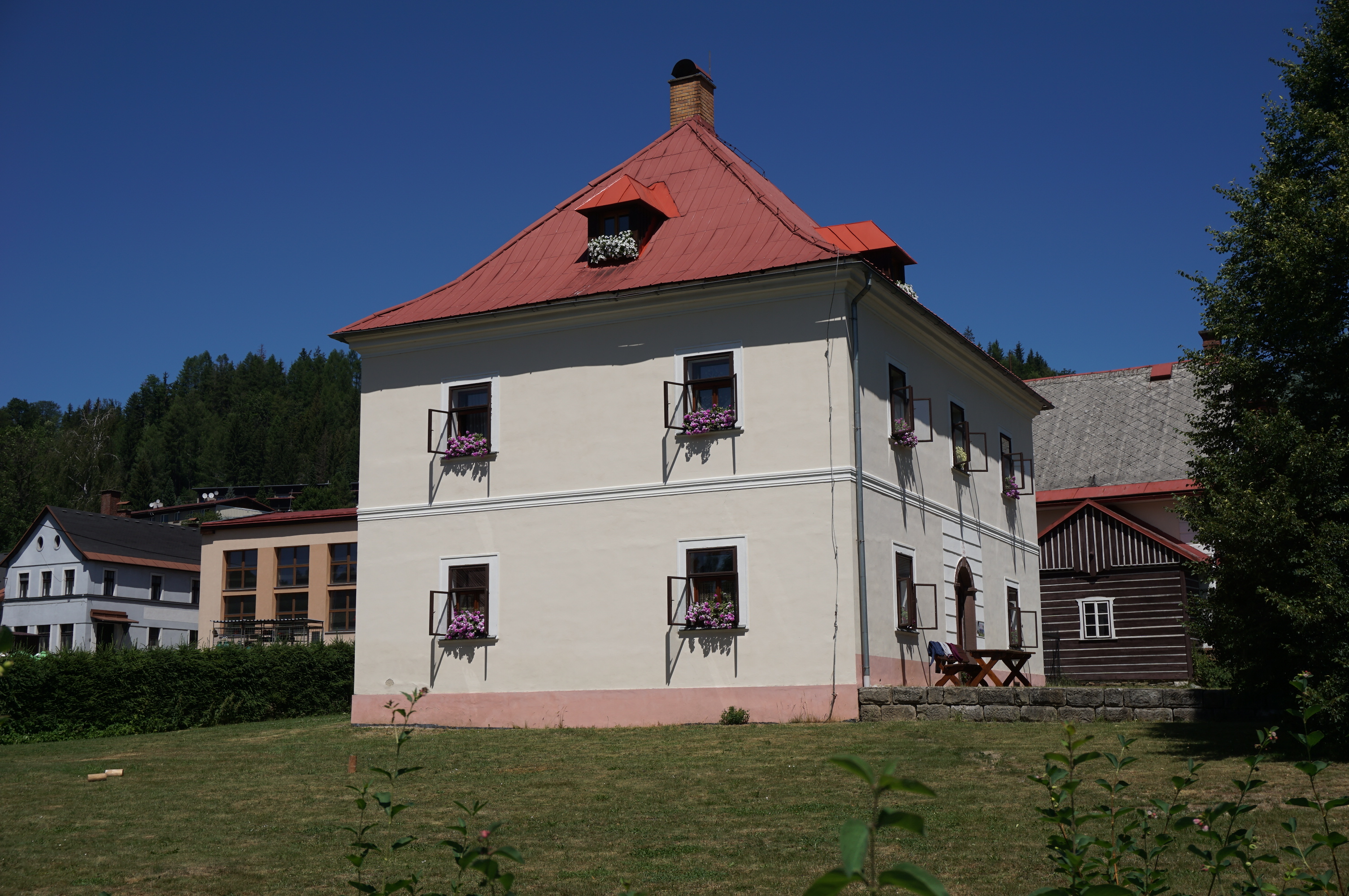 Fara, Jablonec nad Jizerou 429, Jablonec nad Jizerou.